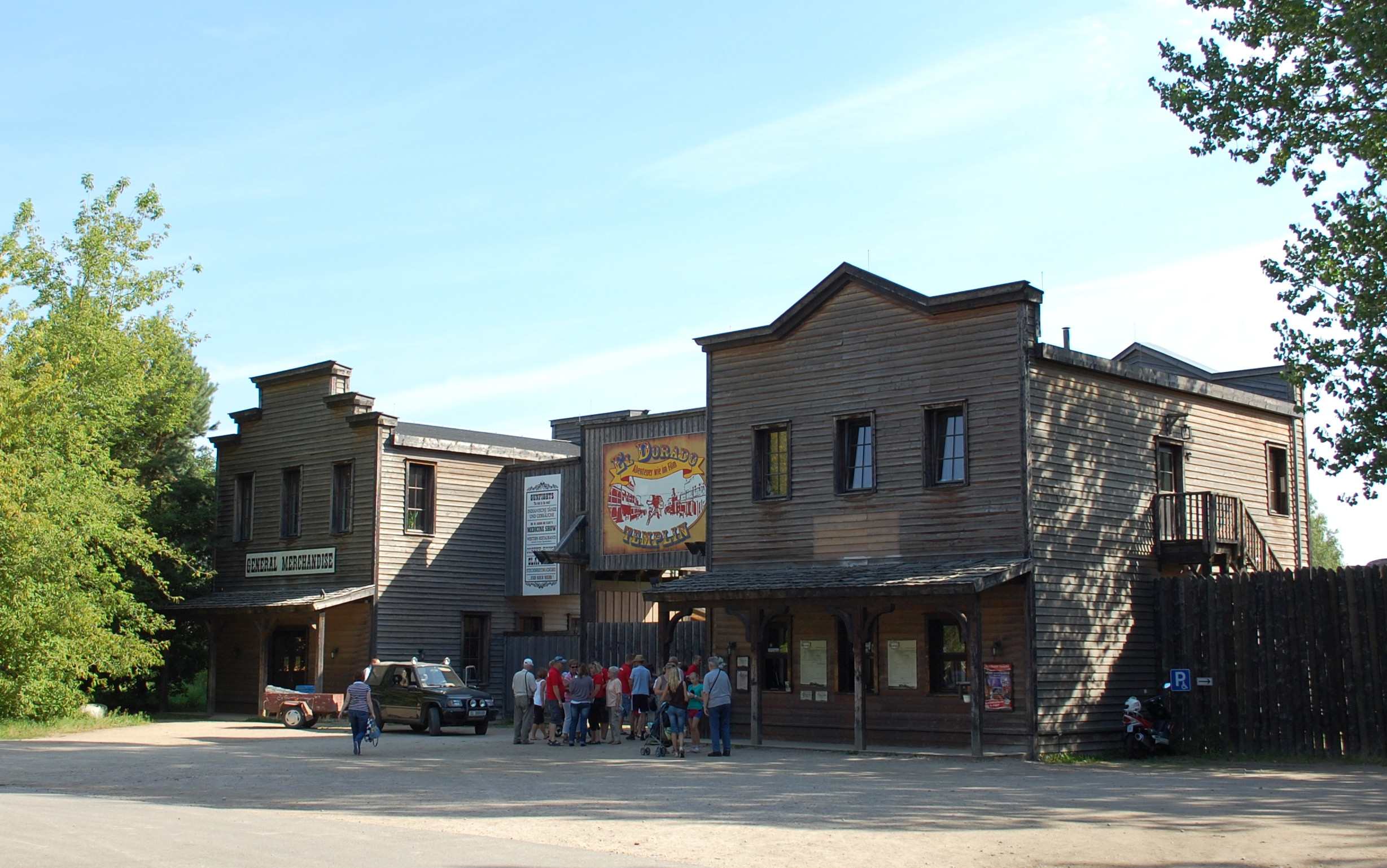 Templin Eldorado Eingang